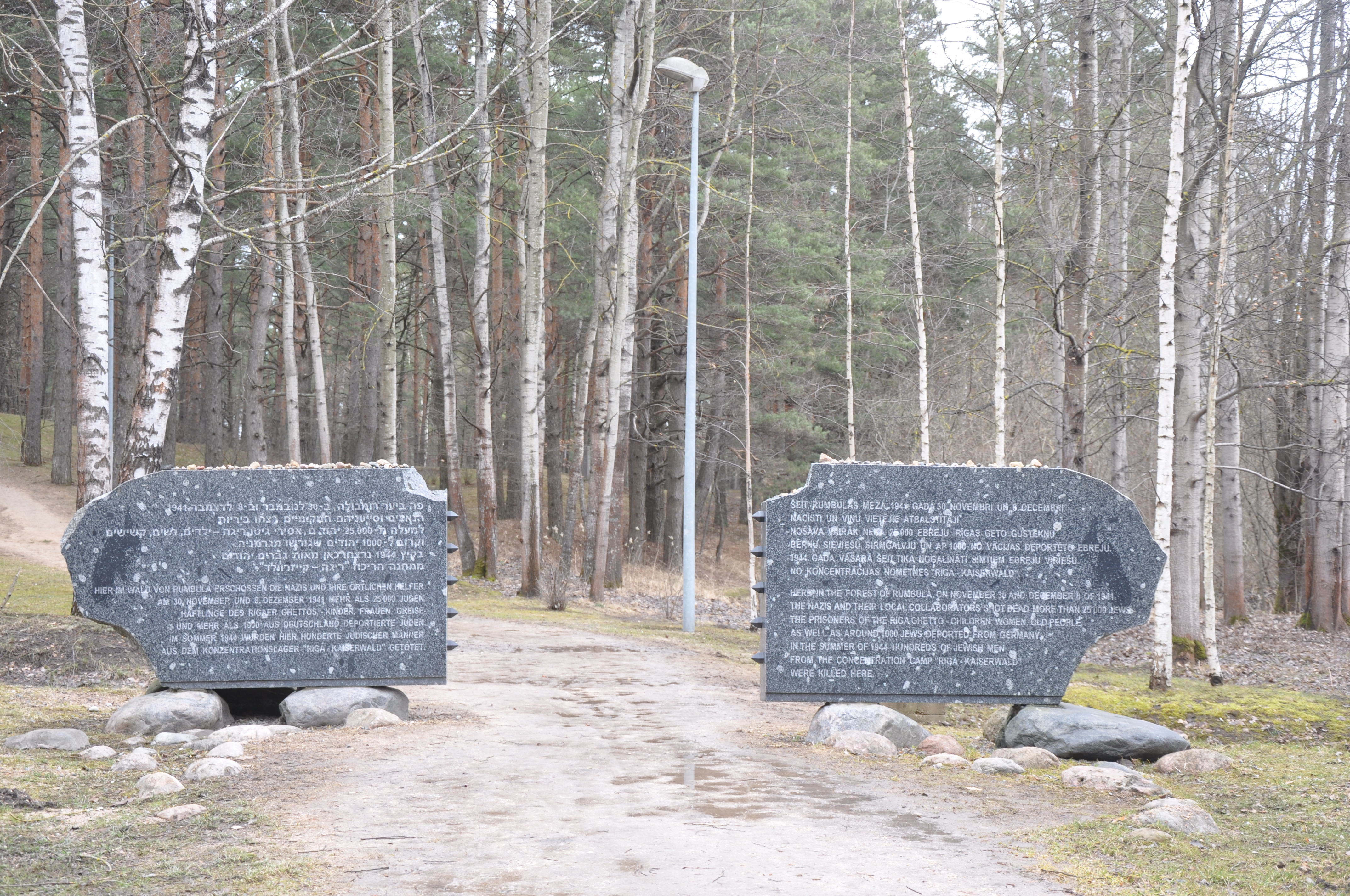 Ebreju masu kapa vieta Rumbulas mežā (vairāk kā 26000 cilvēku) WW2, Rumbula, Rīga, Latvia